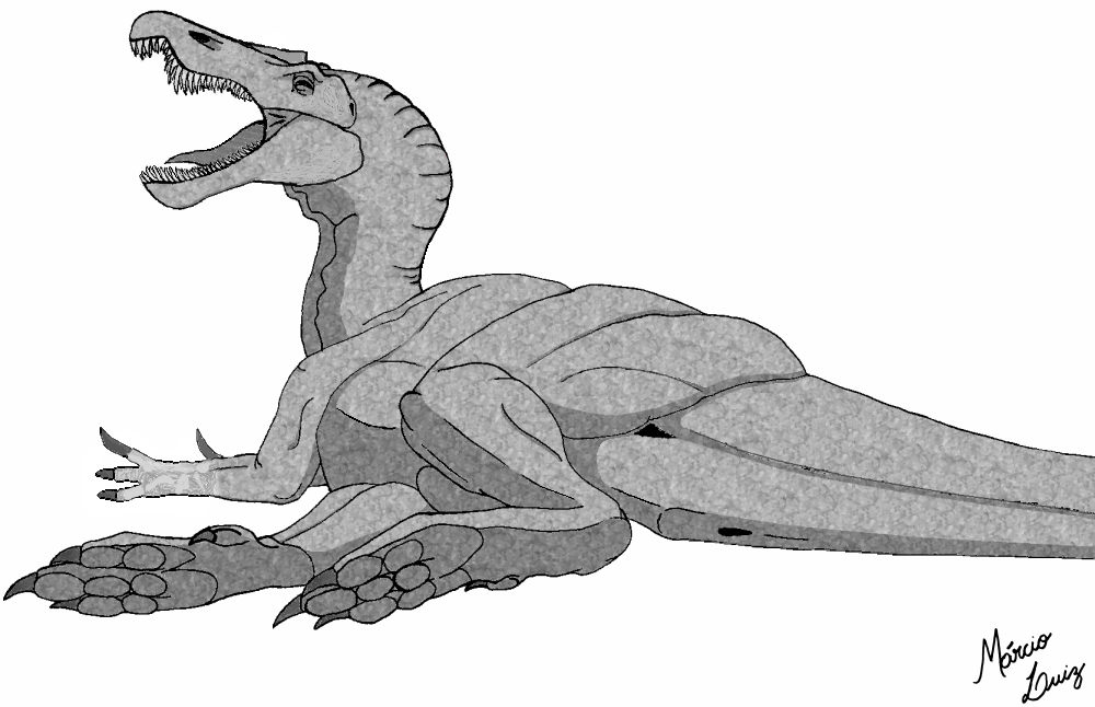 A sleepy Baryonyx.